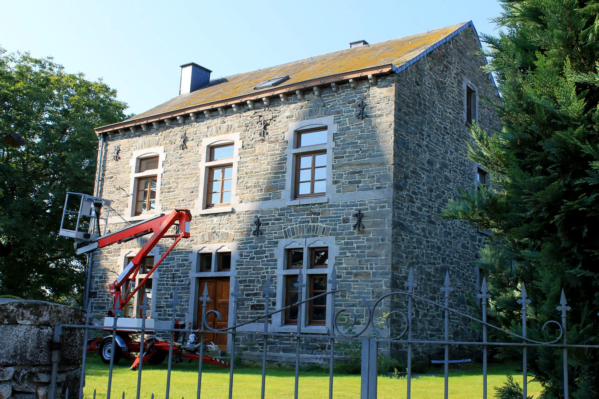 Boeur - Presbytery